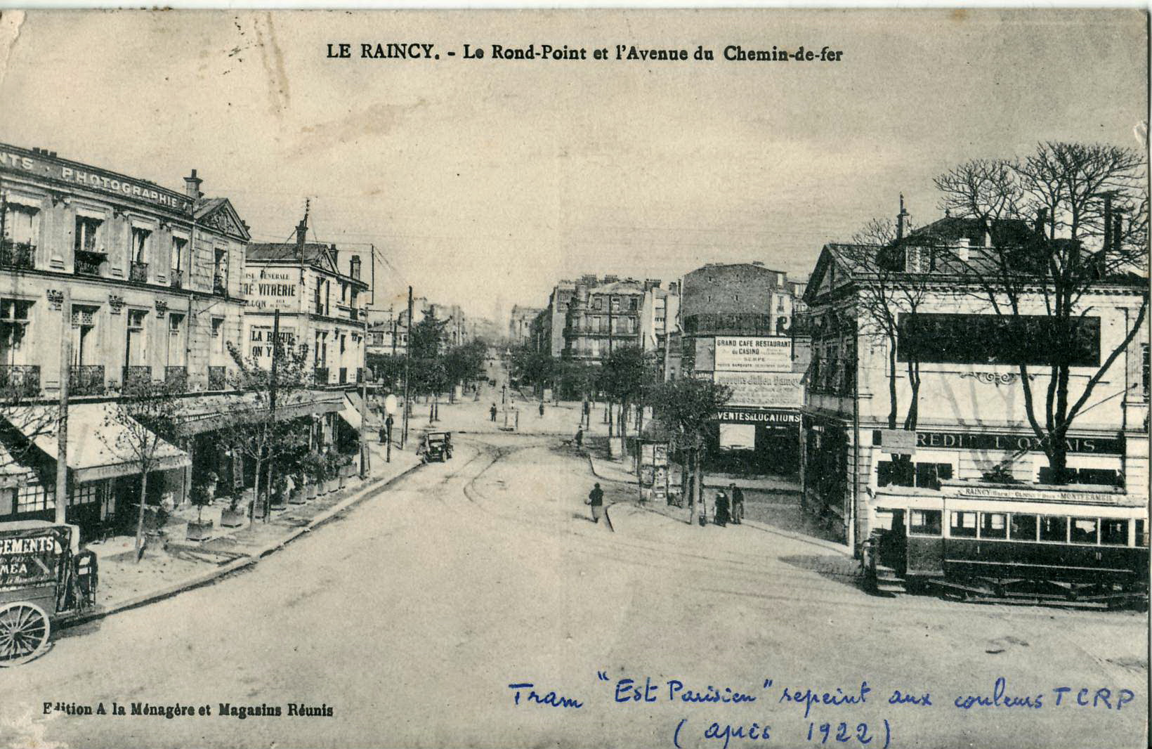 Carte postale ancienne éditée par "À la ménagère et magasins réunis" :LE RAINCY - Le Rond-Point et l'Avenue du Chemin de fer"Mention manuscrite du premier collectionneur : "Tram "Est Parisien" repeint aux couleurs TCRP (après 1922)"